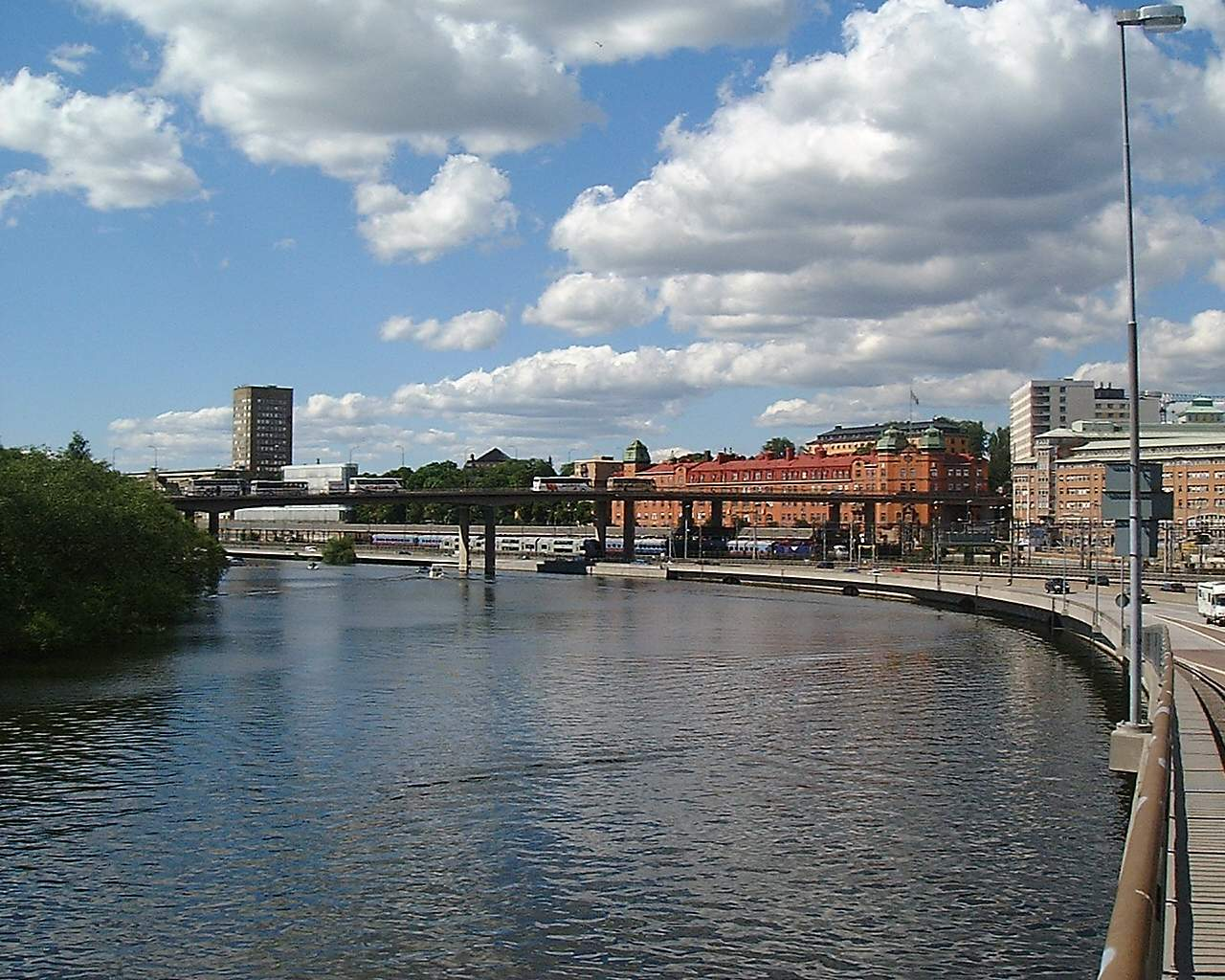 Barnhusbron, Stockholm.